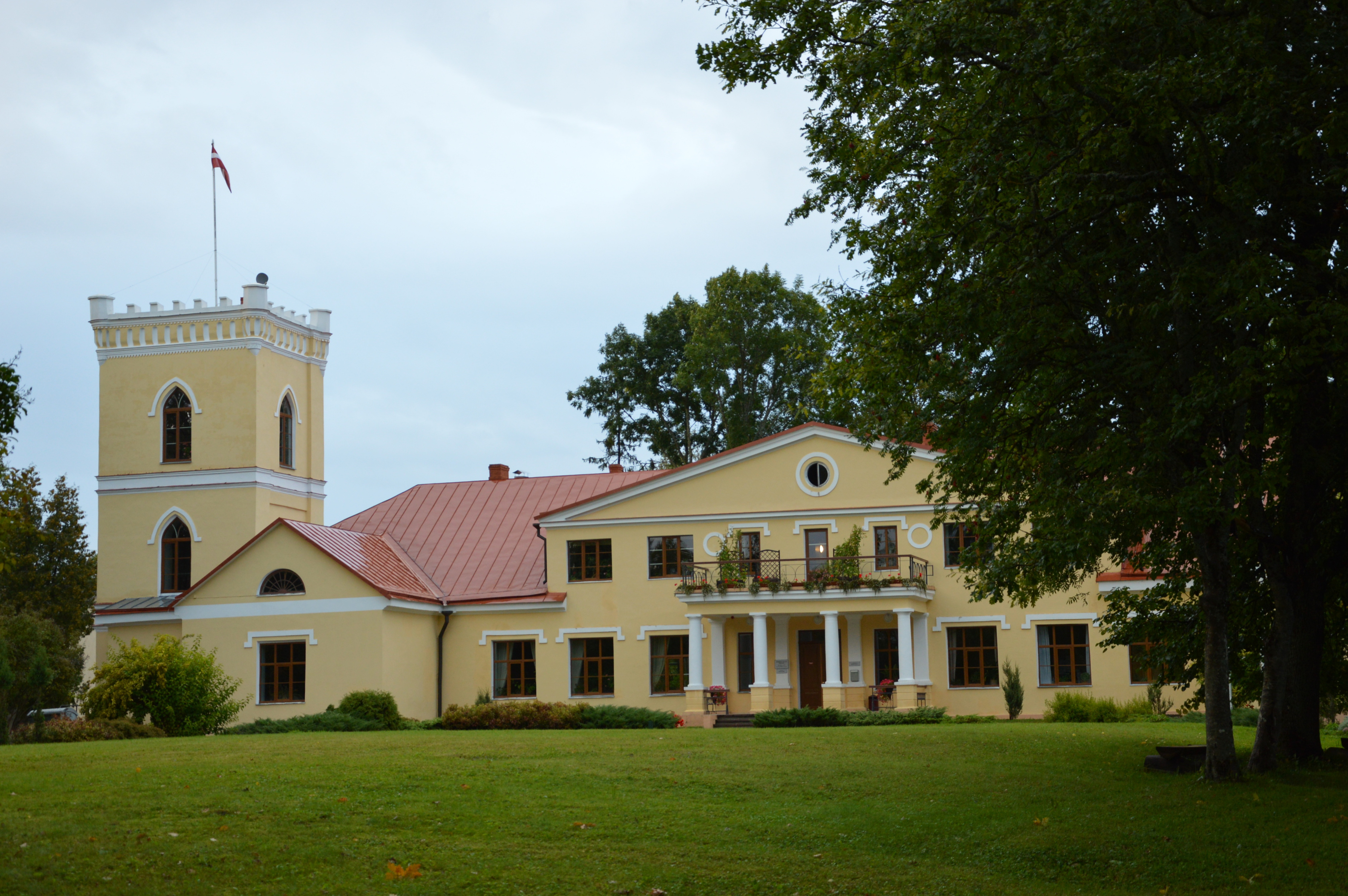 Dzērbene mõis